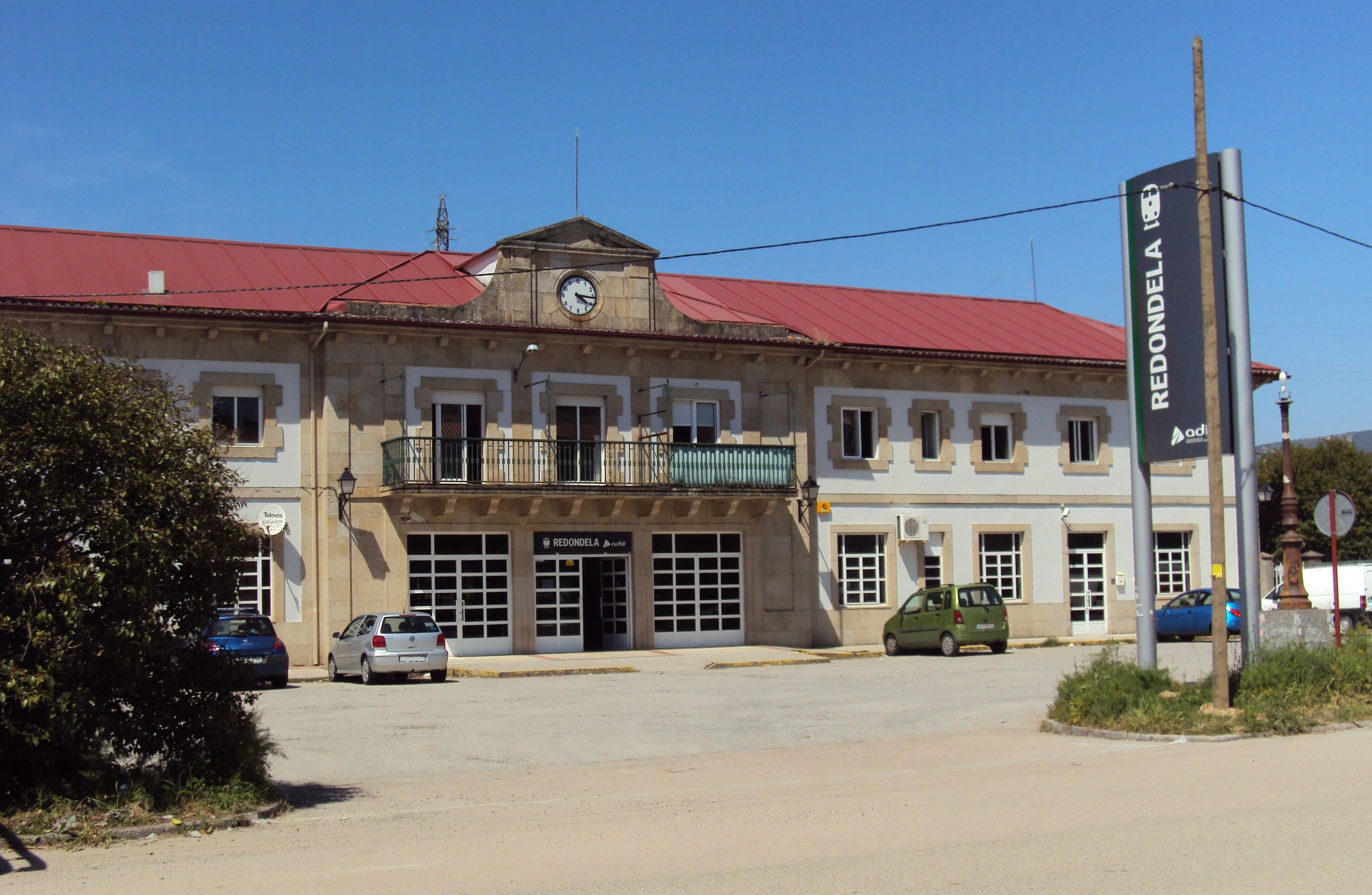 Estación de ferrocarril de Redondela, provincia de Pontevedra, Galicia